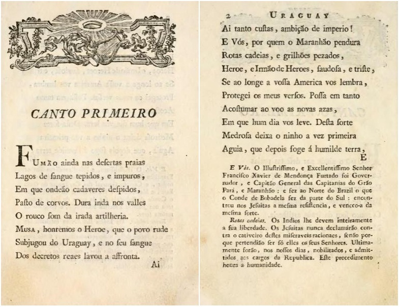 Fac-similar das duas primeiras páginas do canto primeiro de O Uruguai, de Basílio da Gama